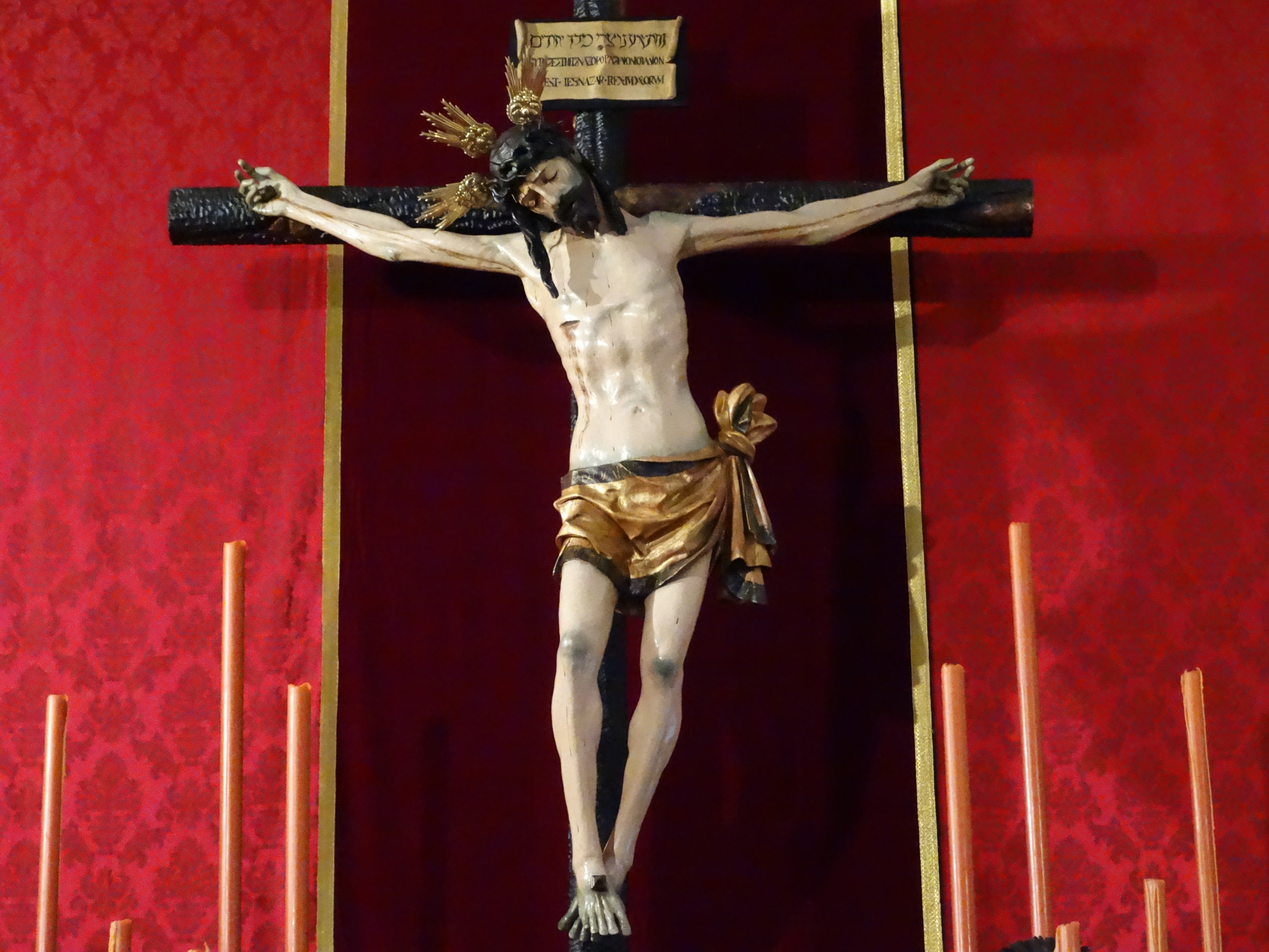 El Santísimo Cristo de San Felipe expuesto en su altar.